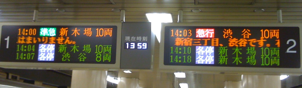 小竹向原駅発車標＠2009年6月